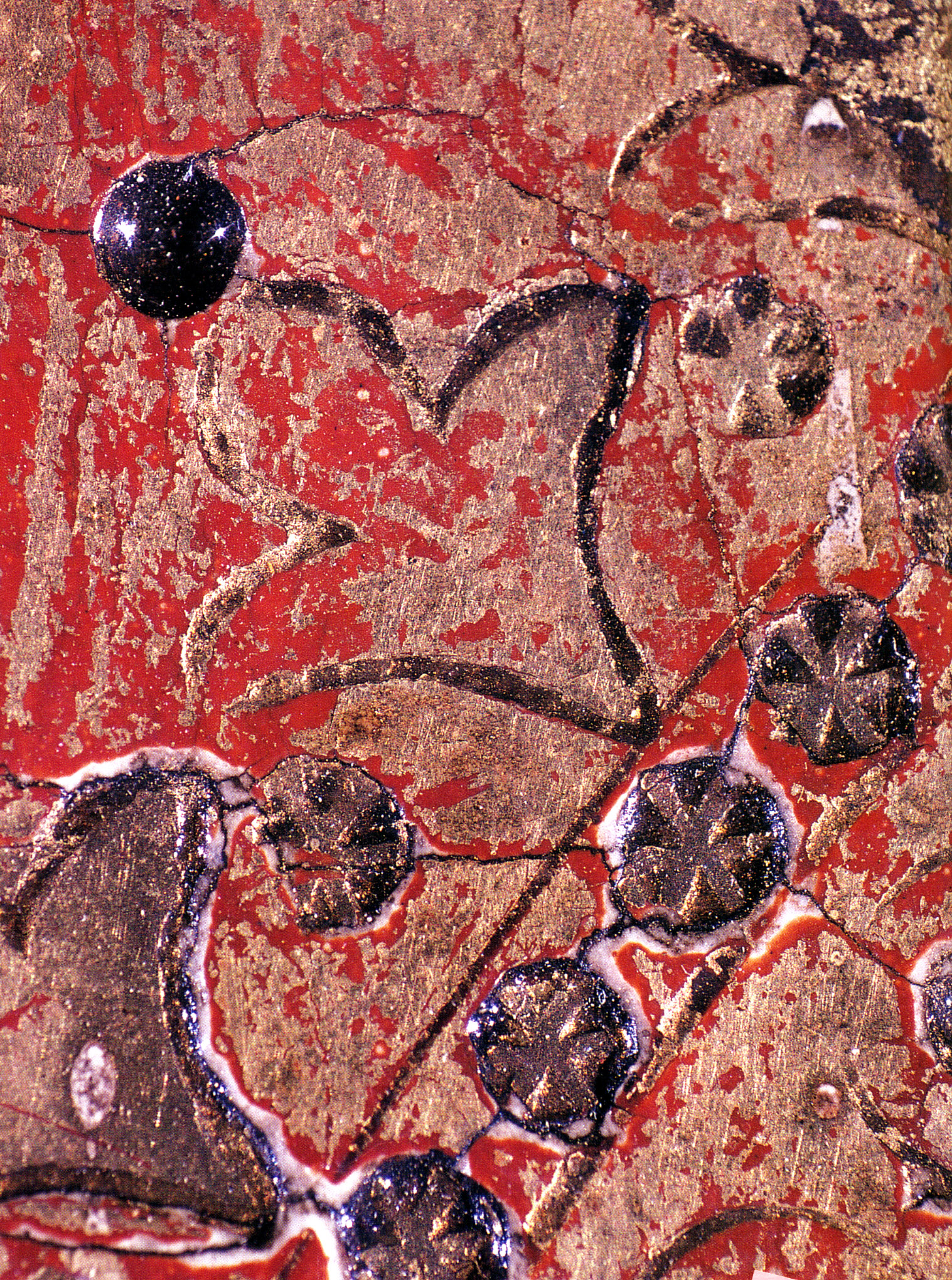 Motivpunzen dienten zur optischen "Bereicherung" der vorgoldeten Hintergründe in der mittelalterlichen Malerei.